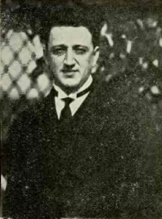 inż. Jerzy Rudlicki